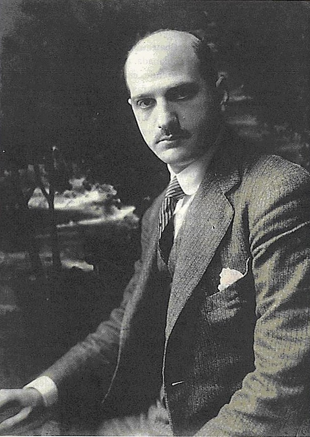 Ermelino Matarazzo (Sorocaba, 1 de março de 1883 — Bruzolo, 25 de janeiro de 1920) foi um empresário brasileiro, primeiro filho brasileiro de Francisco Matarazzo e o escolhido para sucedê-lo. Substituiu o pai no comando das empresas durante a Primeira Guerra Mundial.